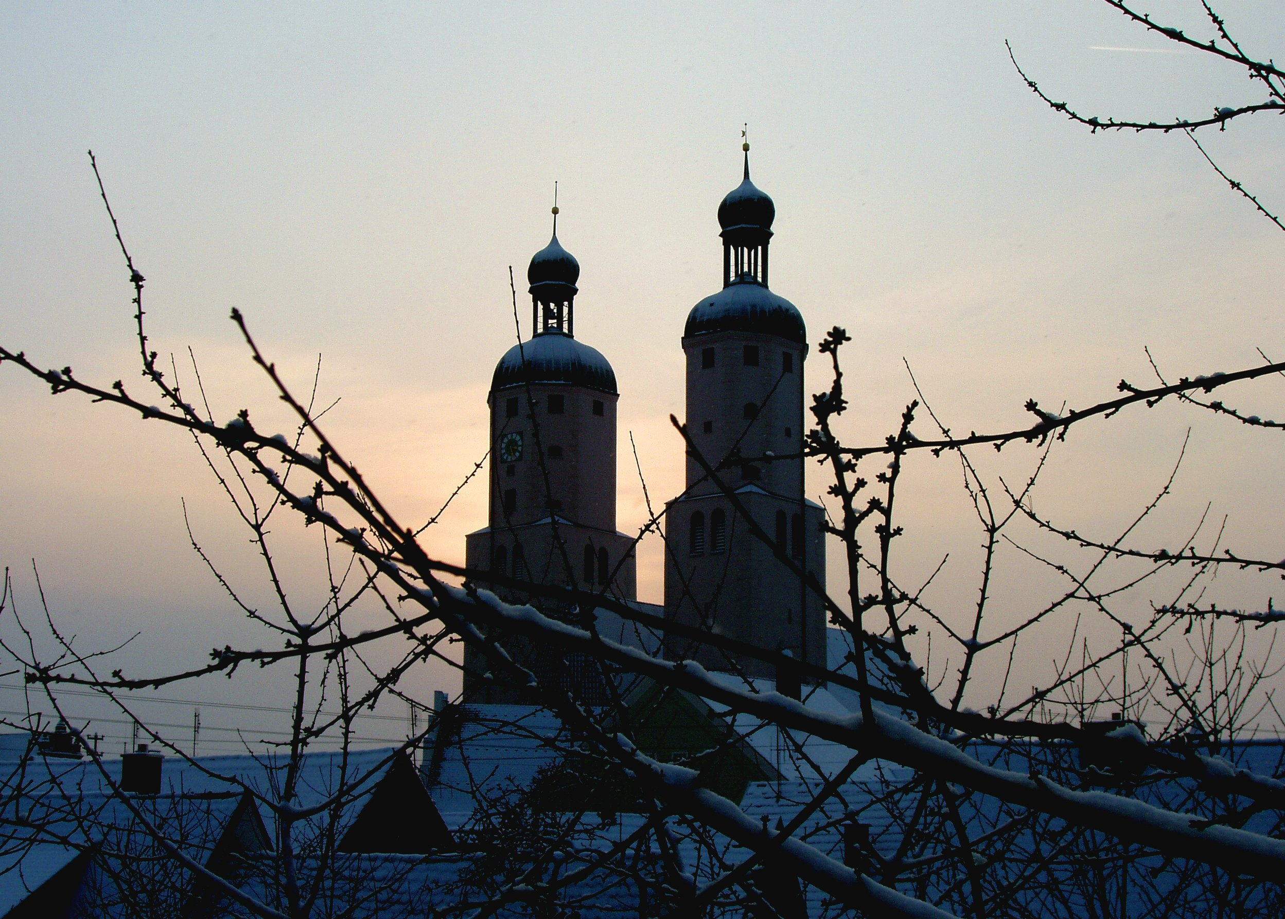 *Stadtpfarrkirche Wemding in 2005